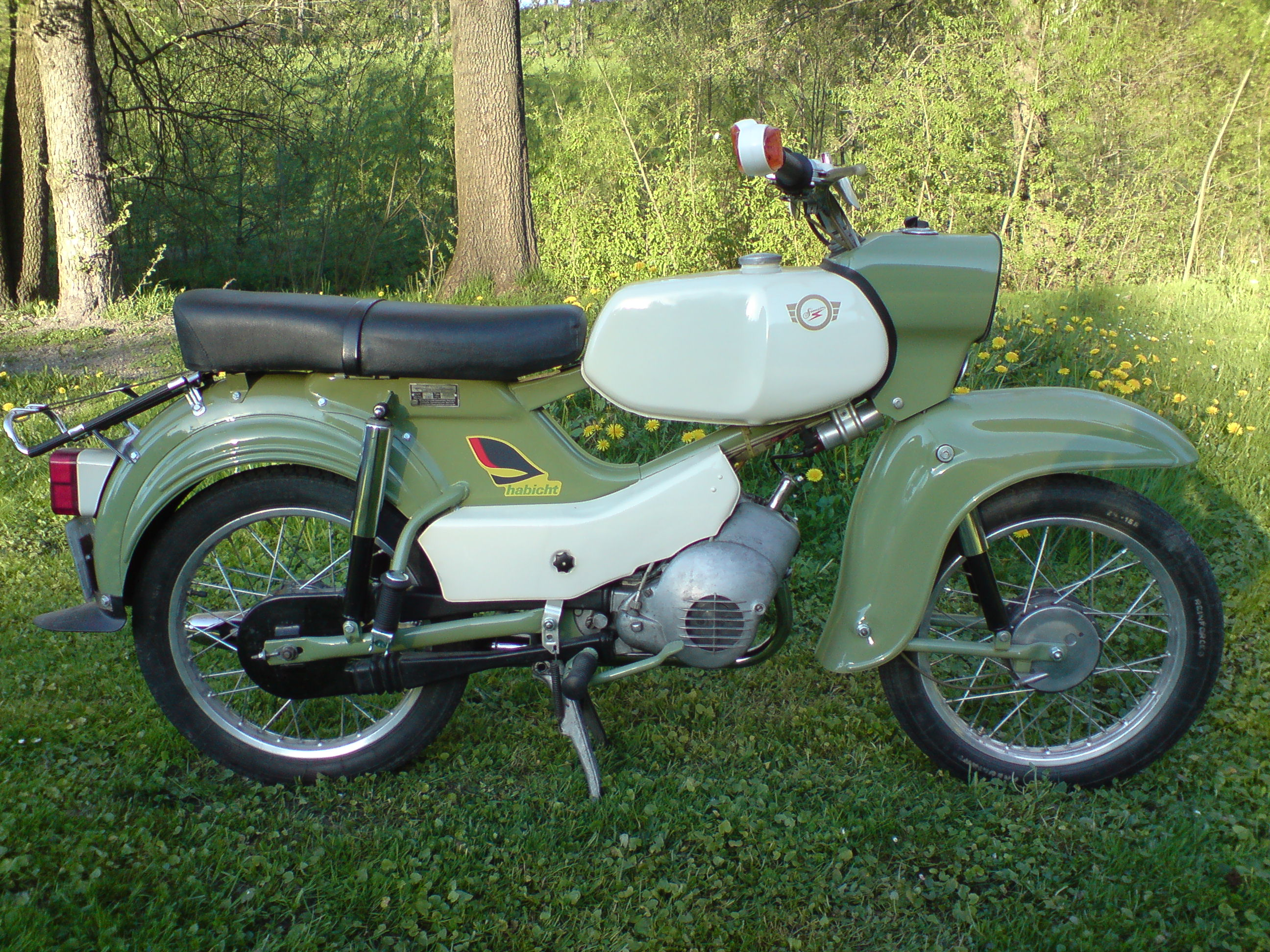 Simson SR4-4 "Habicht"